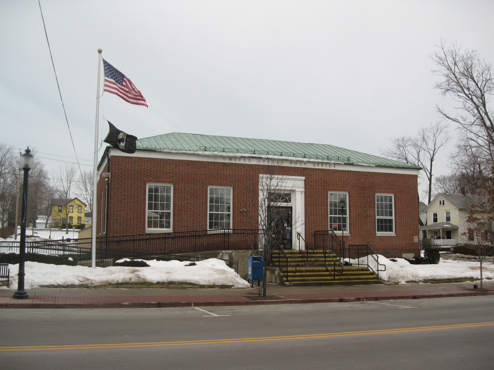 Angola, New York